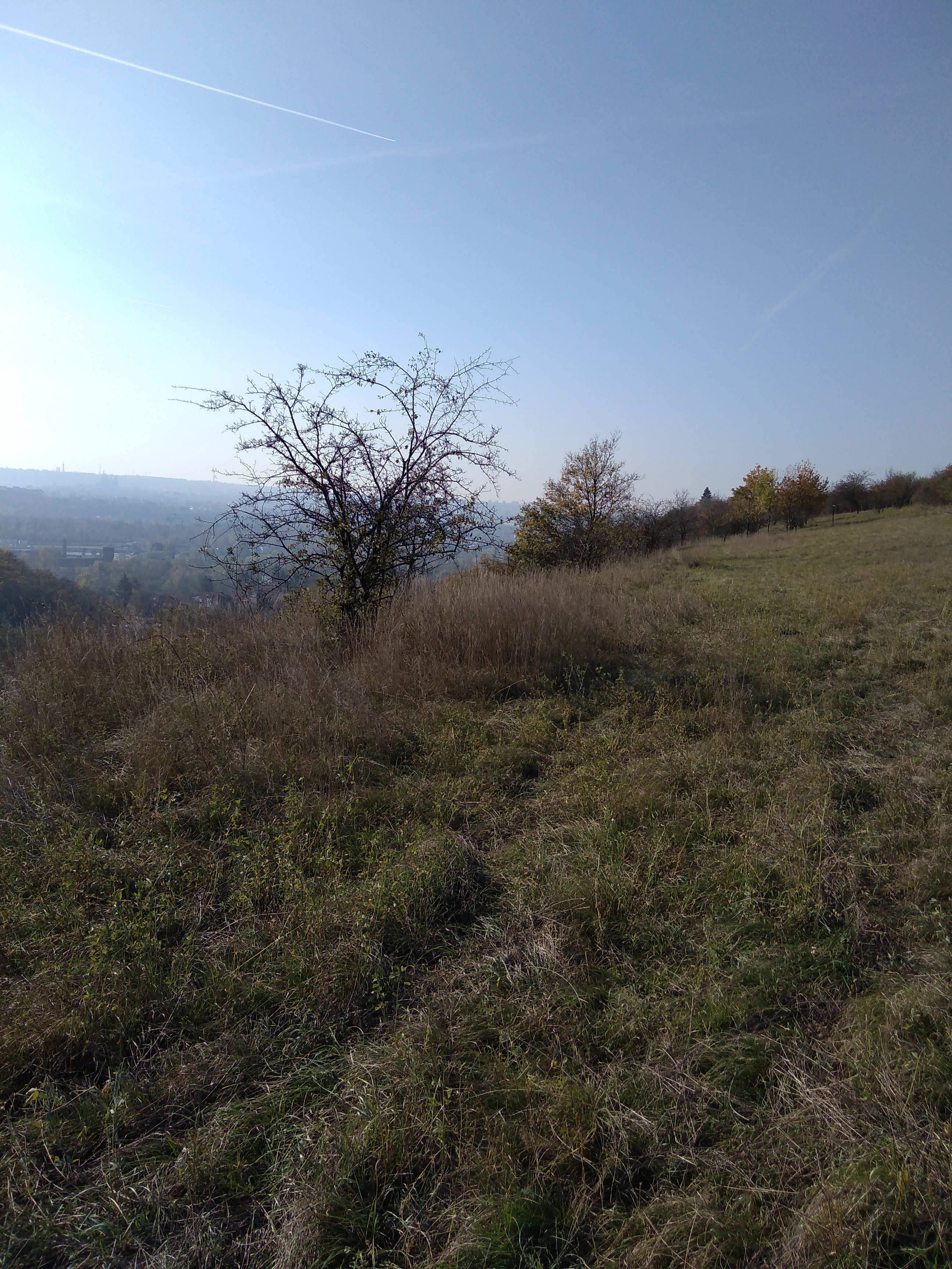 Pohled ze shora na přírodní památku Trojská na Praze 8